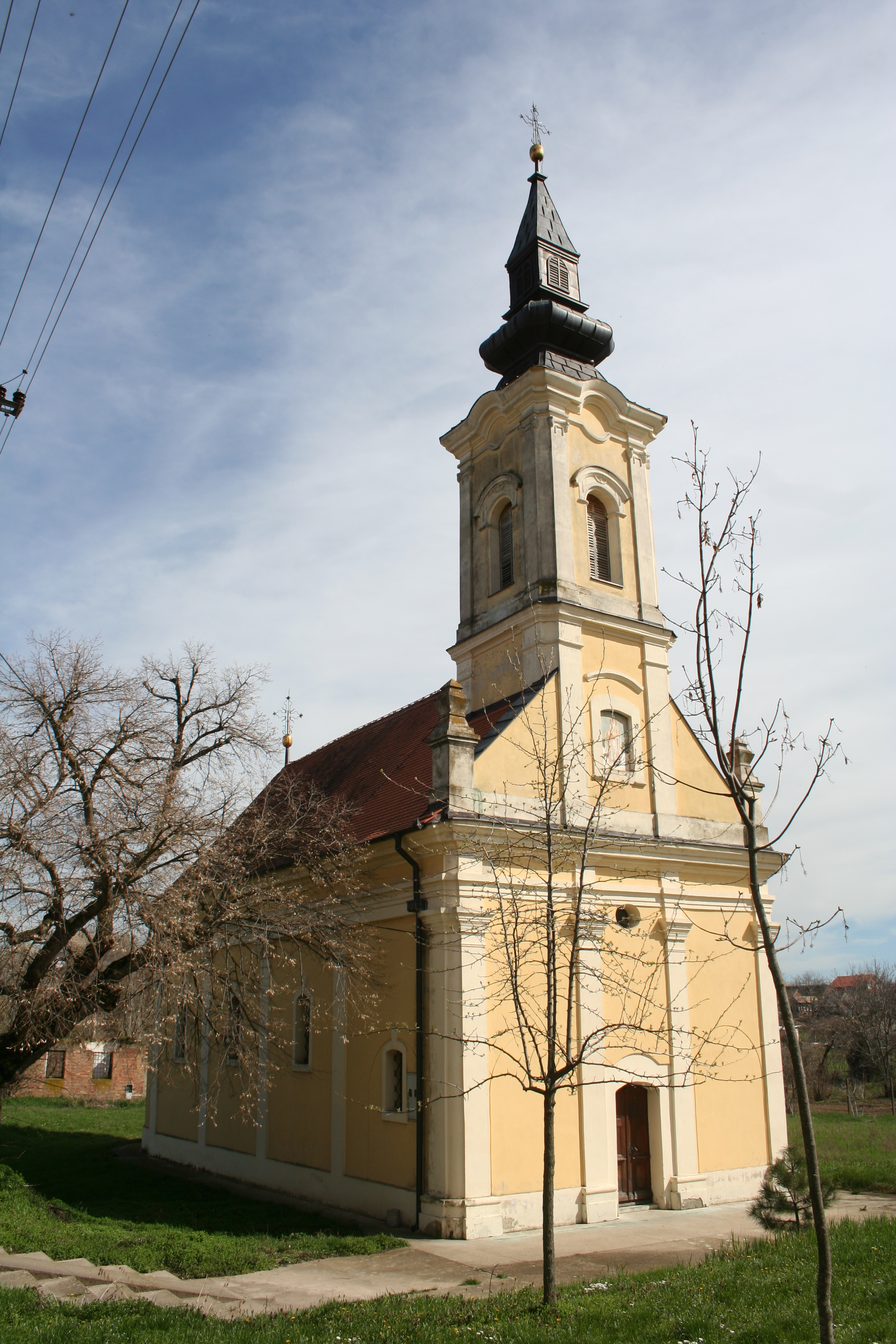 Crkva Sv. Nikole (Šuljam)